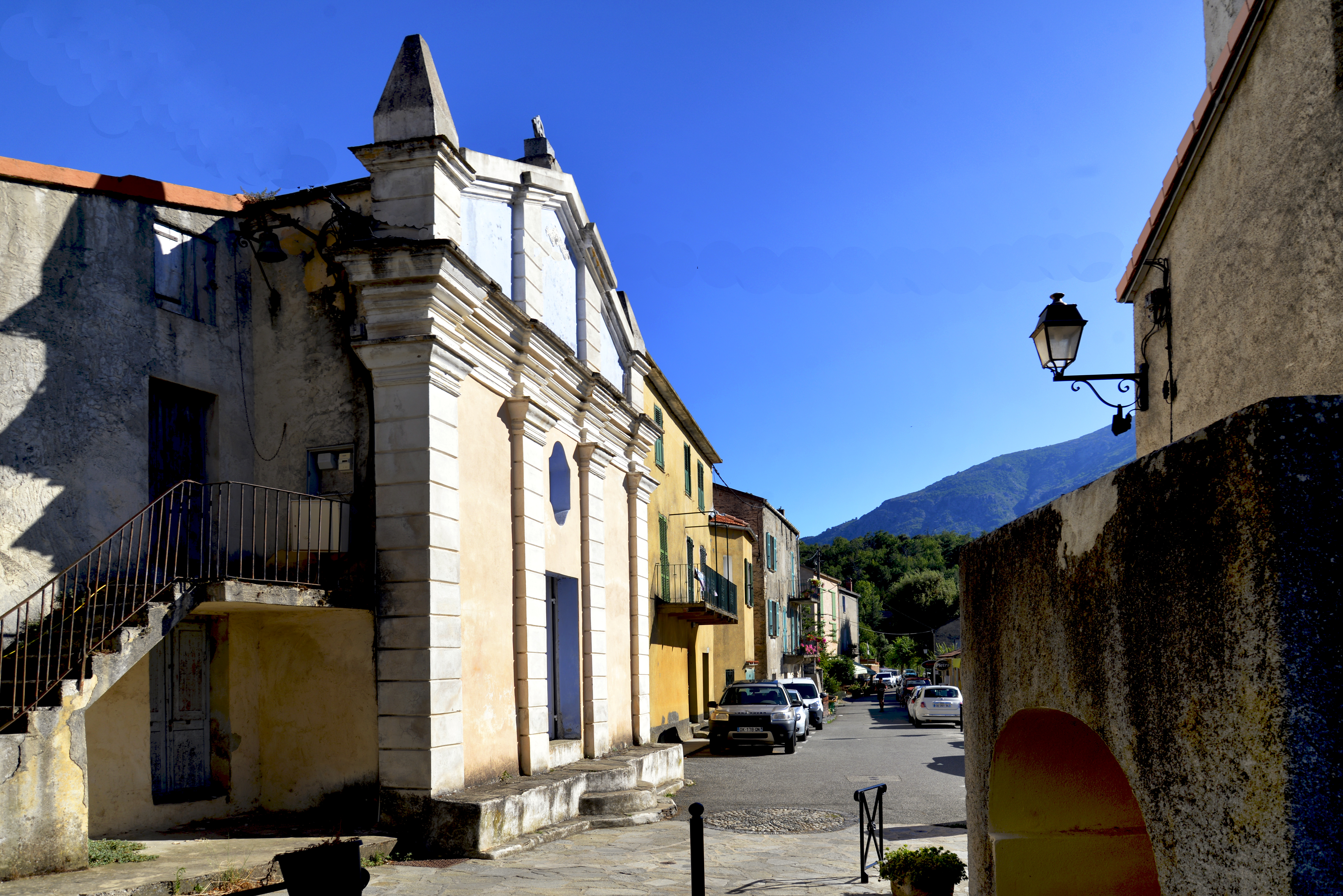 Poggio-di-Venaco, Centre Corse - La rue principale du village vue depuis la chapelle San Roccu.